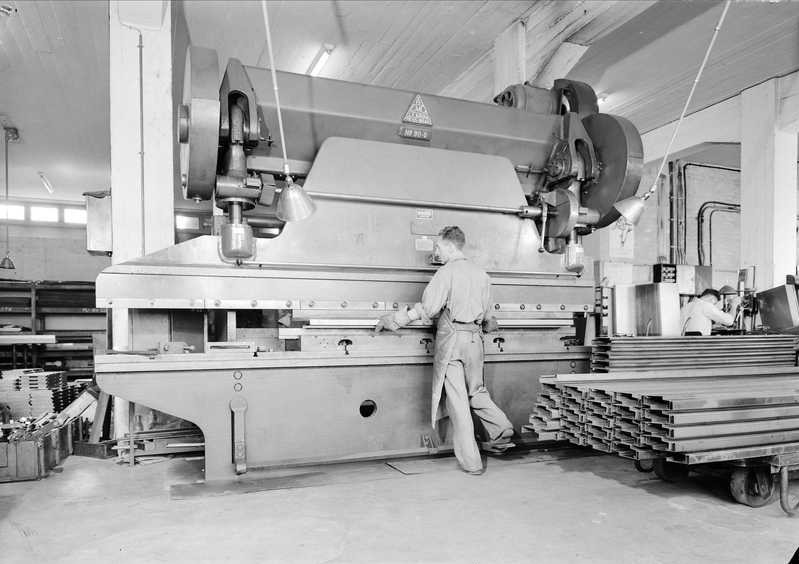 Produksjon av stålprofiler, Romo fabrikker, 1953.